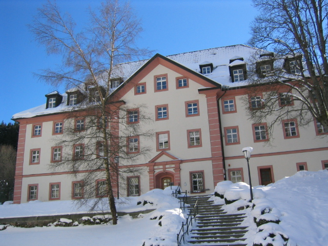 Das Mädcheninternat des Kollegs St. Blasien, selbst fotografiert (EBB), Februar 2005